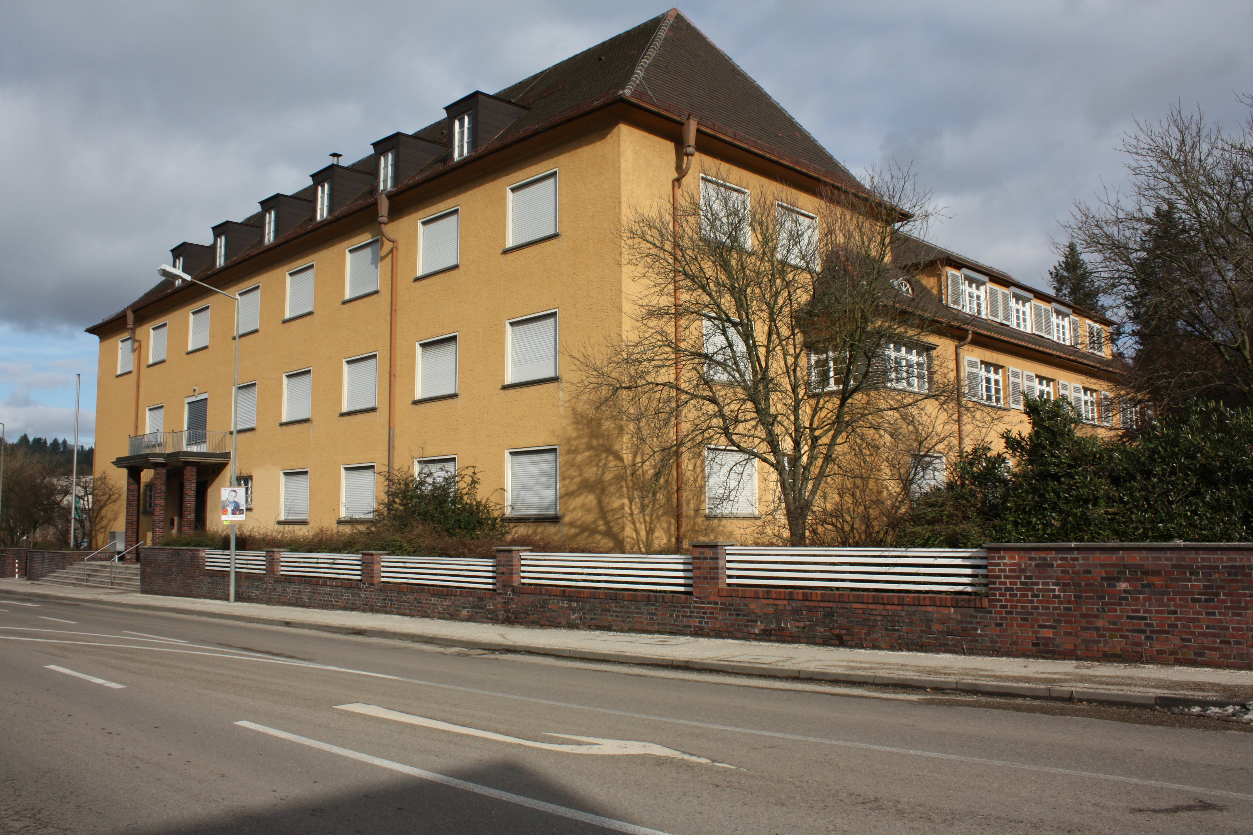 Das Amtsgericht Schwäbisch Gmünd, erbaut 1928